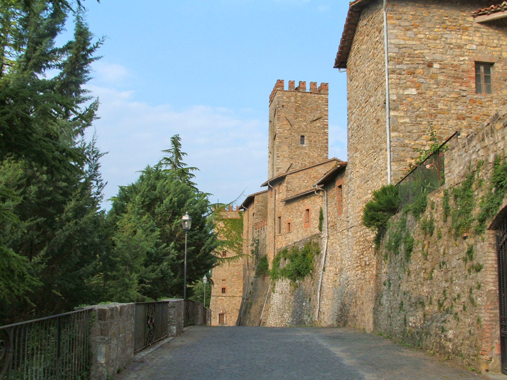 Liliana Gioli